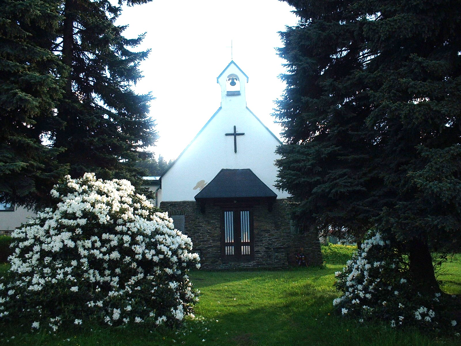 Kaple Cyrila a Metoděje